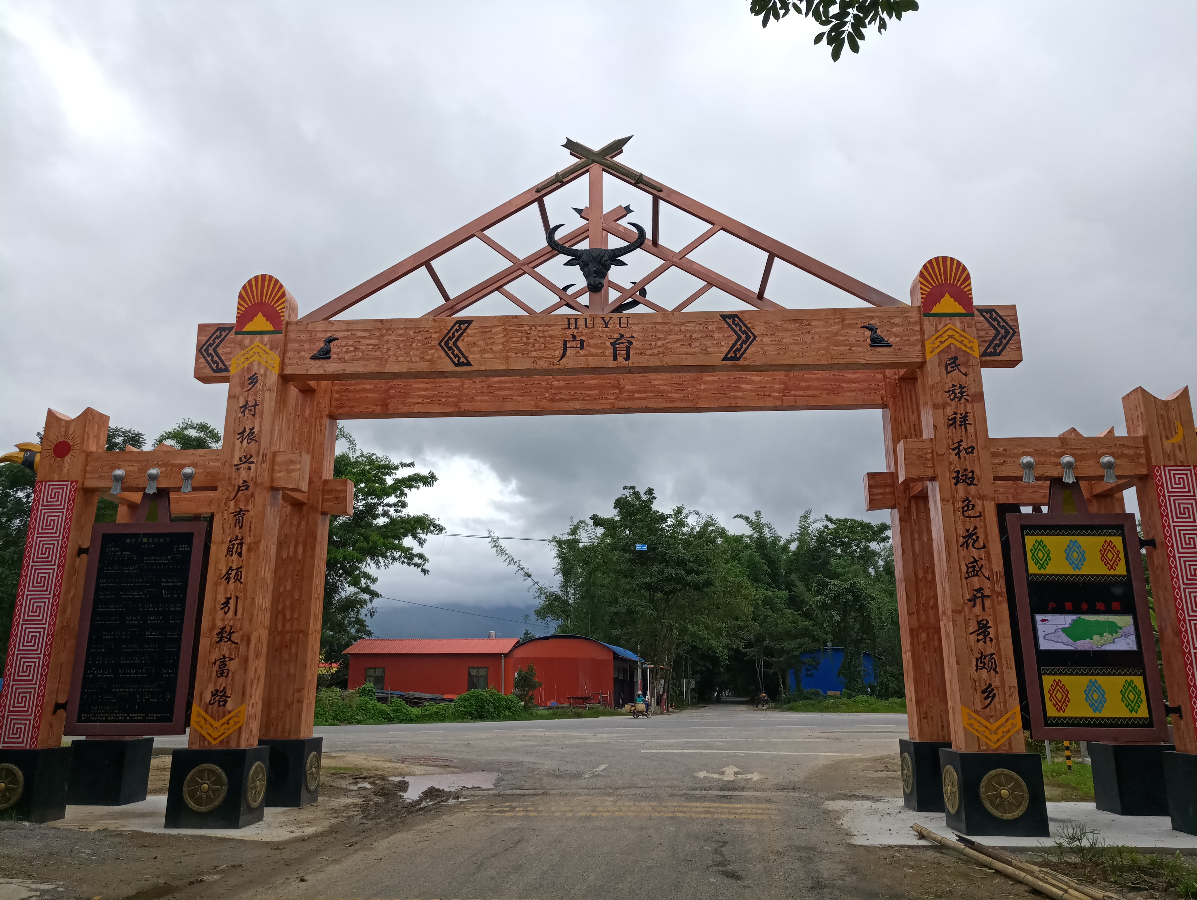 中文（中国大陆）: 户育乡-牌坊